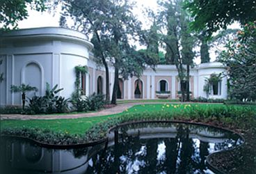 Fachada da Fundação Cultural Ema Gordon Klabin Native nameFundação Cultural Ema Gordon KlabinLocationSão Paulo, BrazilEstablished1978Website (São Paulo, SP)